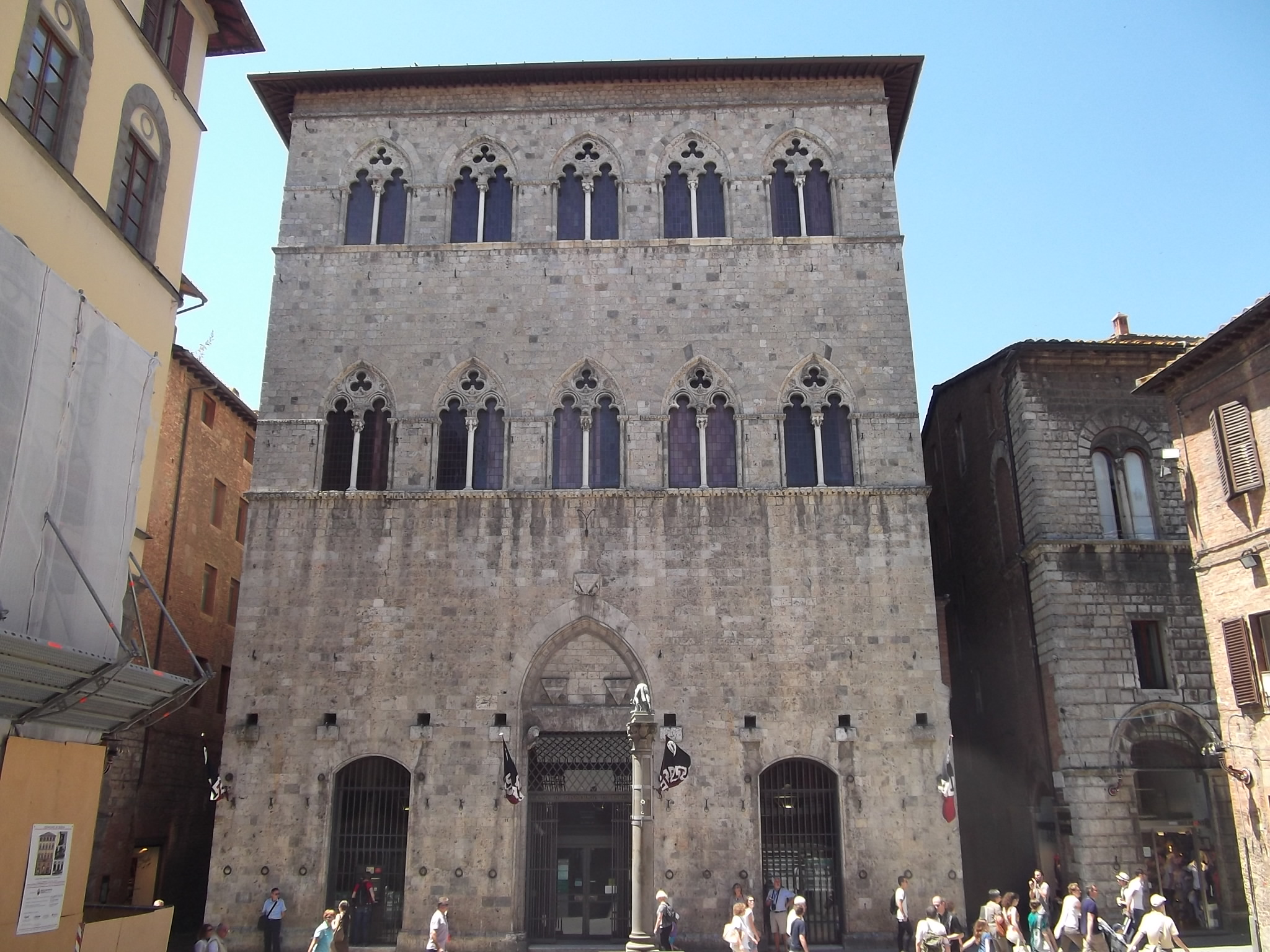 Palazzo Tolomei in Siena